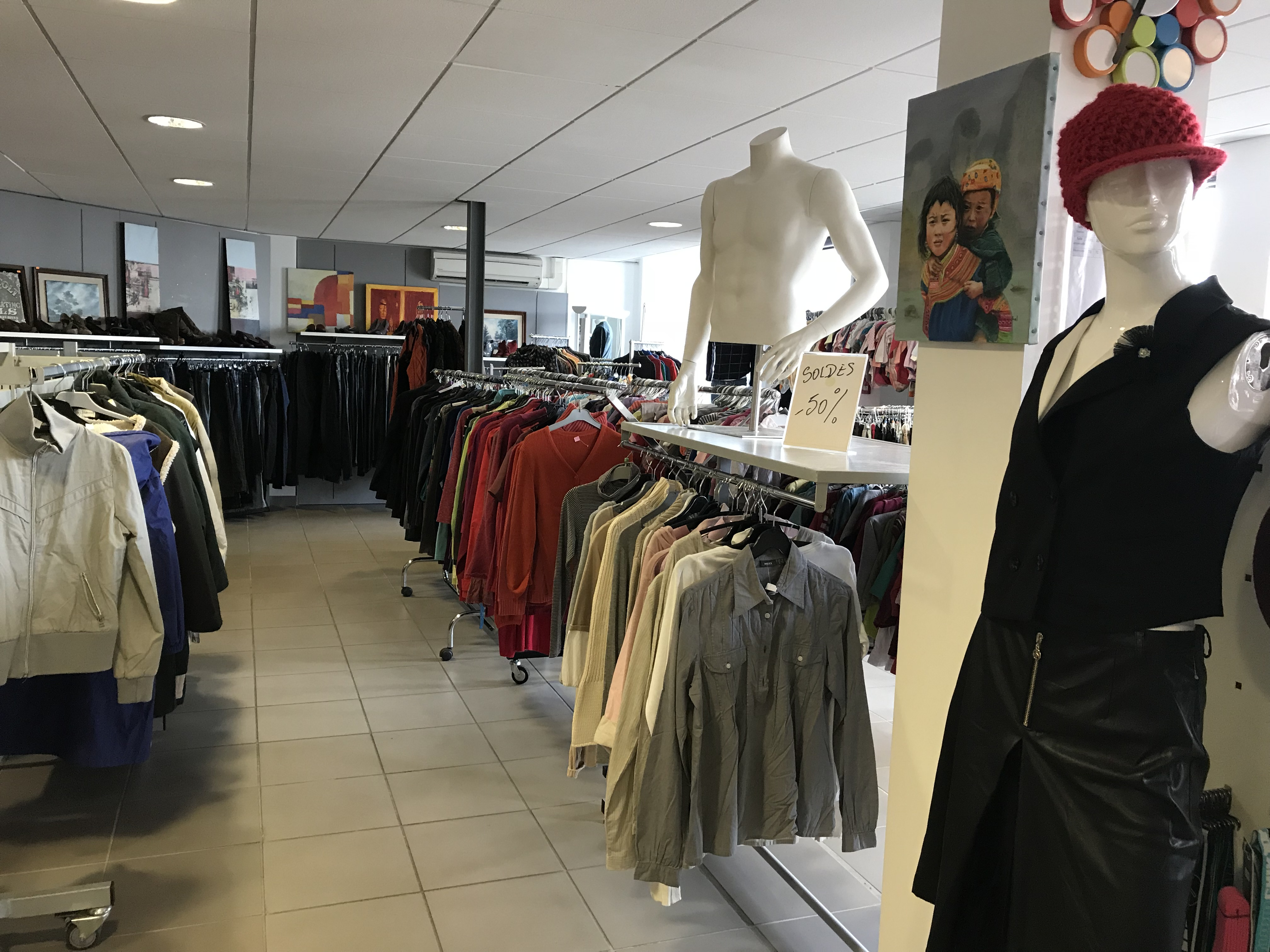 Croix Rouge Française (Villefranche-sur-Saône).